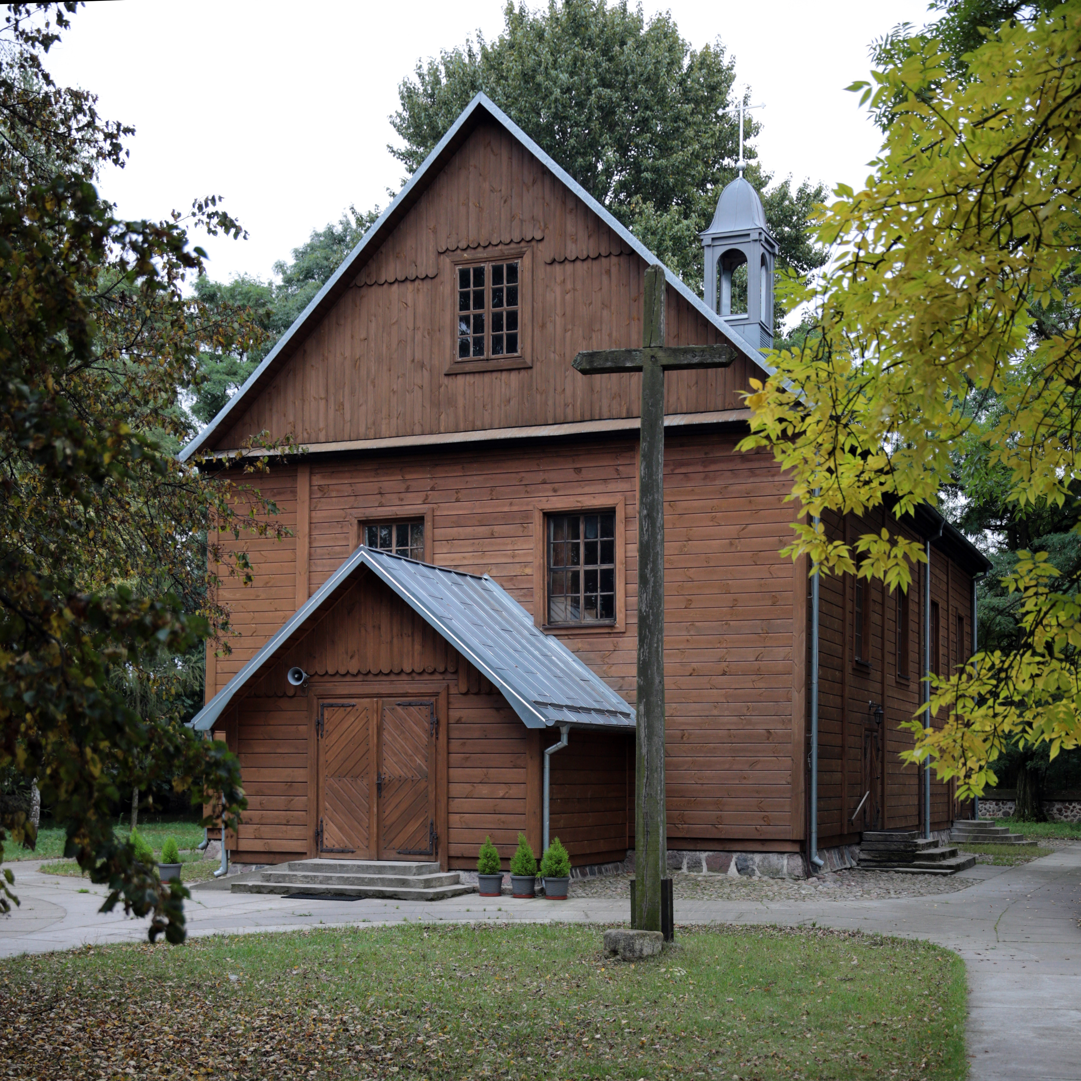 Grodzisk, cerkiew gr.-kat., ob. kościół rzym.-kat. par. pw. Św. Trójcy, 1788, 1852